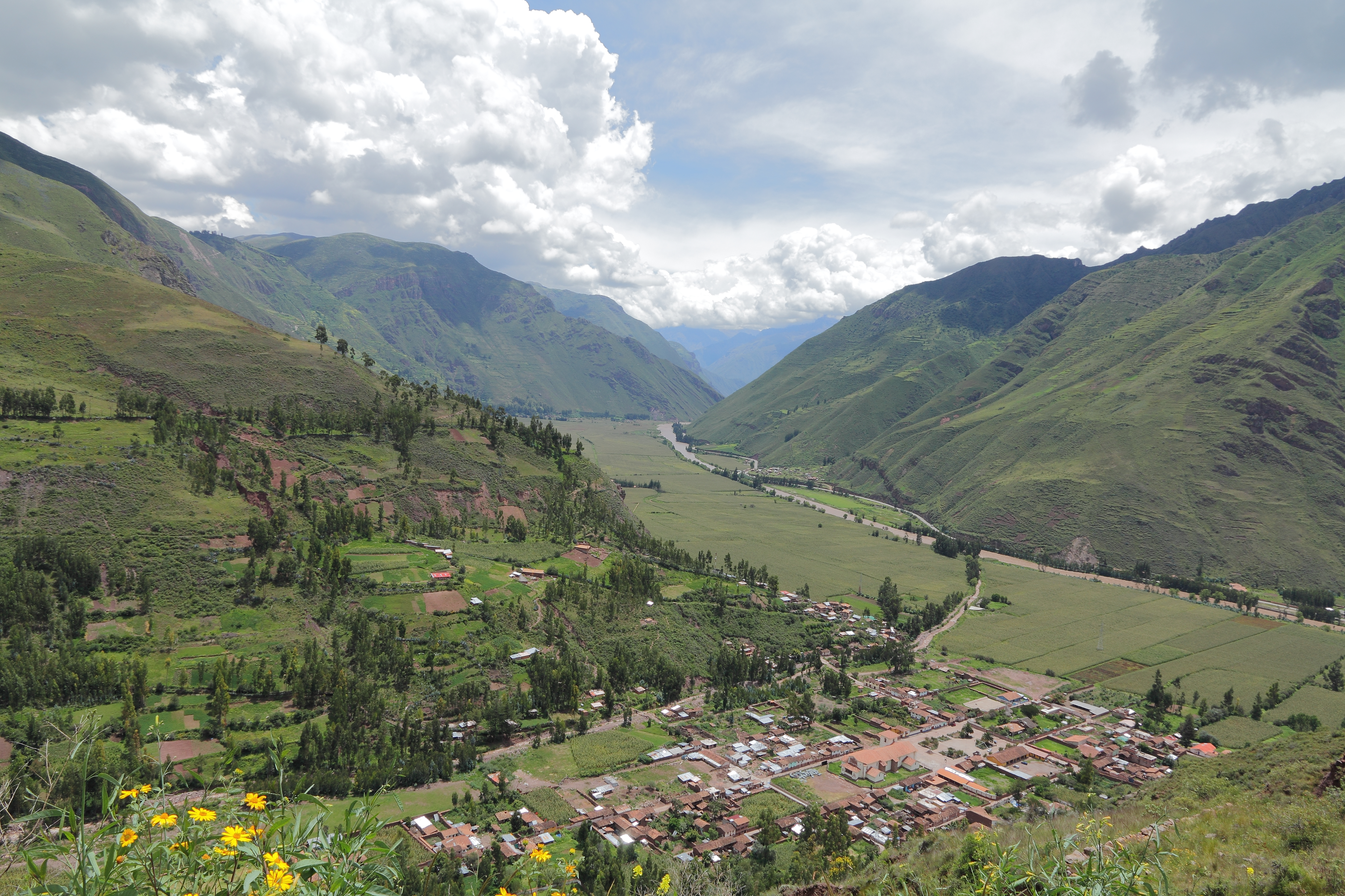 Urubambadalen, Cusco, Peru.